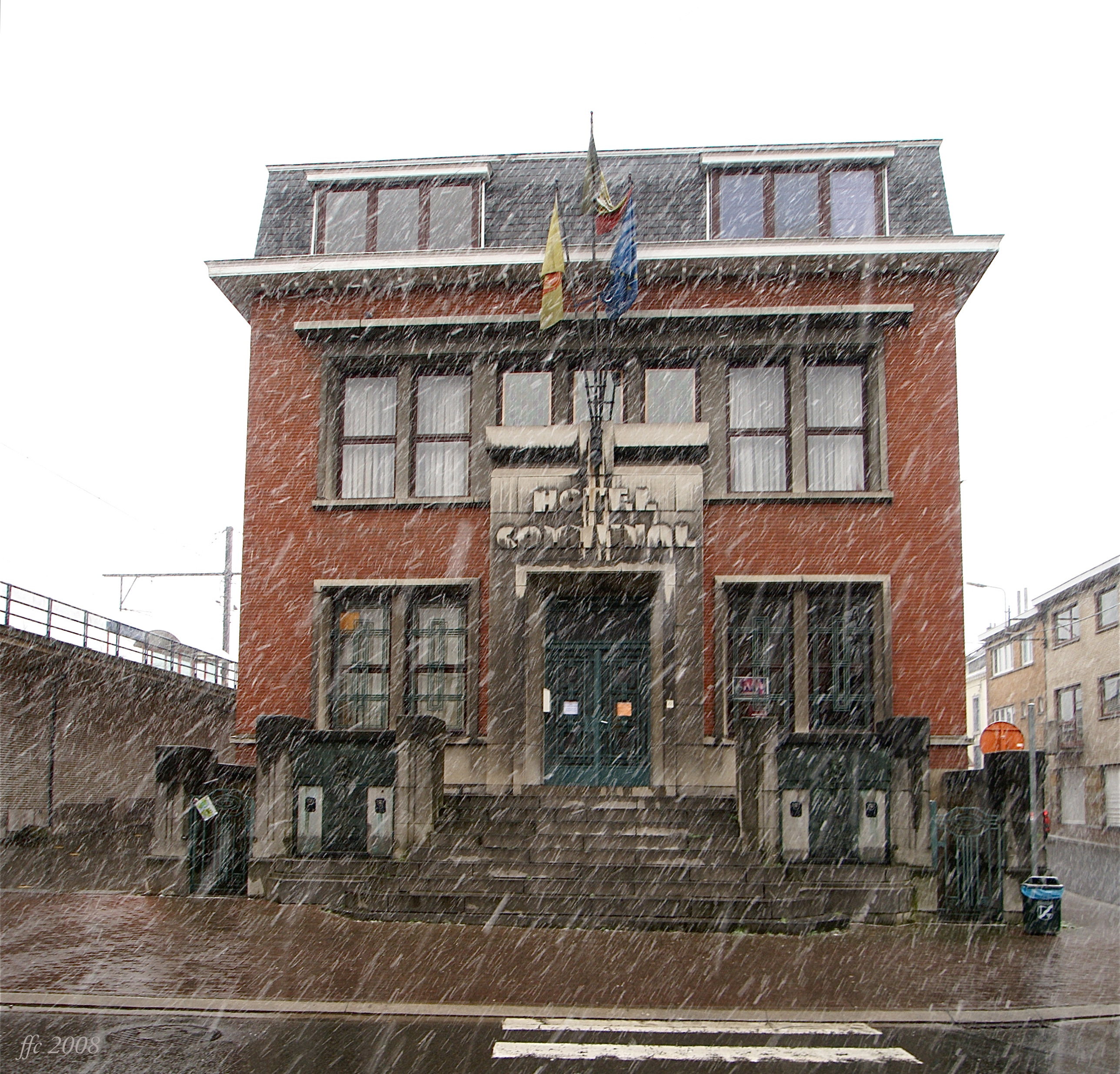 Flémalle-Grande (Belgium) Former Town hall ancienne maison communale Antiga casa de la vila Voormalig gemeentehuis